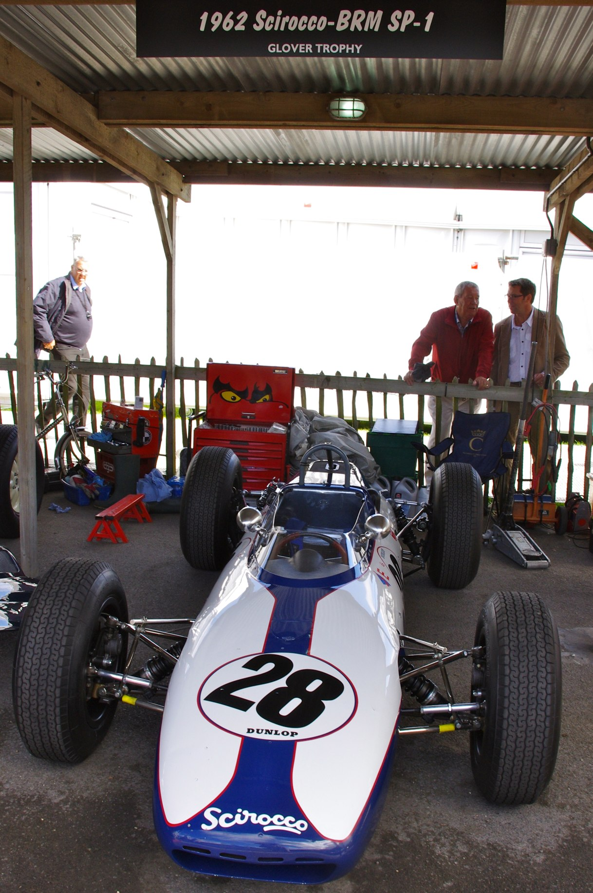 Goodwood Revival 2012